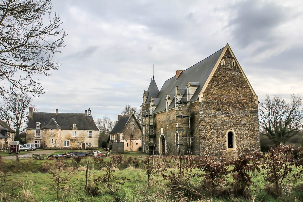 Manoir de Charnacé